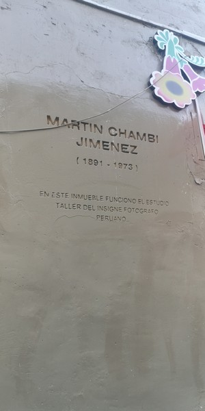 Cartel de la casa de Martín Chambi Jiménez en la Calle Marqués, Cusco, Perú.